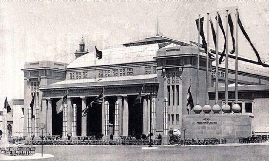 Palau de Projeccions (Barcelona-Catalunya): obra d'Eusebi Bona i Francisco Aznar construït per l'Exposició Universal de Barcelona-1929. Es trobava entre l'Avinguda de la Reina Maria Cristina, l'Avinguda Rius i Taulet i la Plaça de l'Univers. . Enderrocat després de l'exposició.